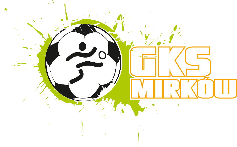 Herb GKS Mirków